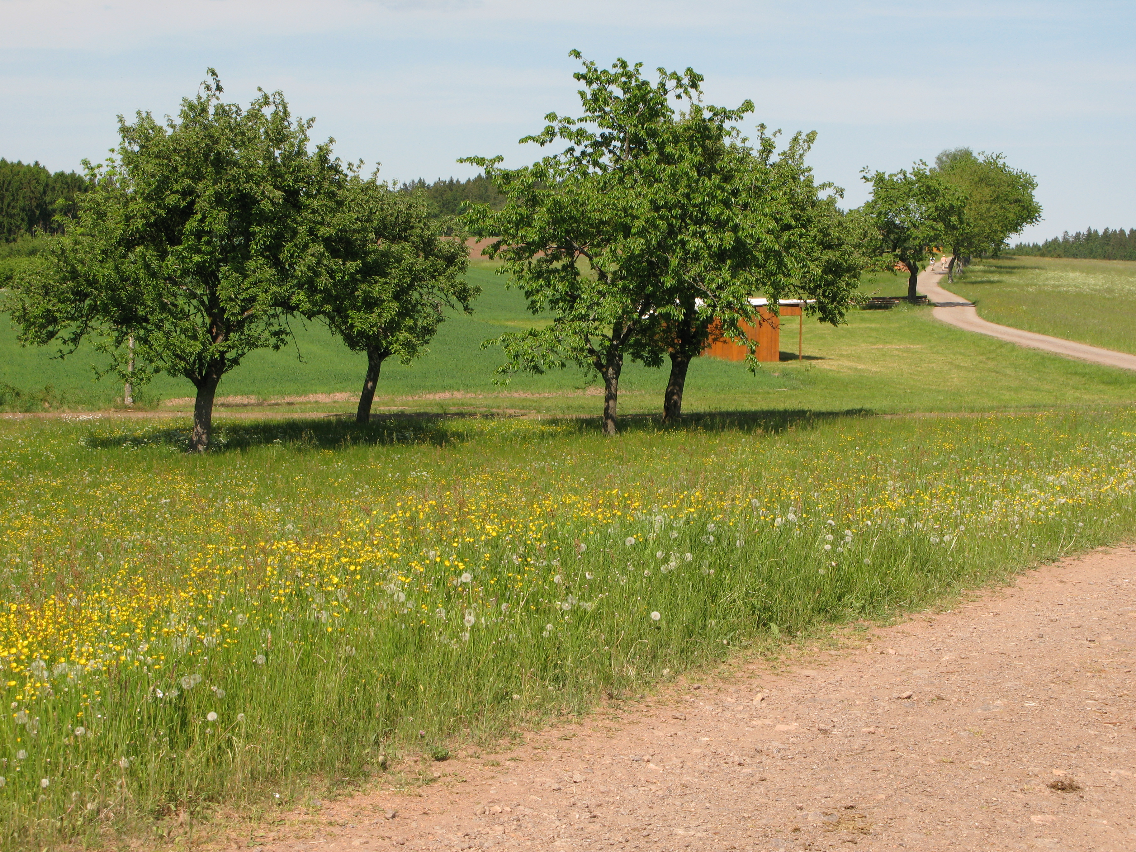 Am Flachenberg im Schwarzwald an der Wanderwegkreuzung zum Zweitälersteig, Grosser Hansjakobweg und Schwarzwald-Querweg Rottweil–Lahr.